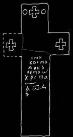 Оброчен камък Винище - възстановка © Emil Petrov 1988